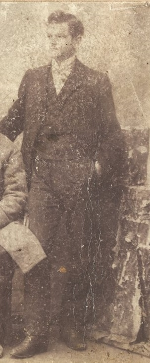 поміщик Косельський